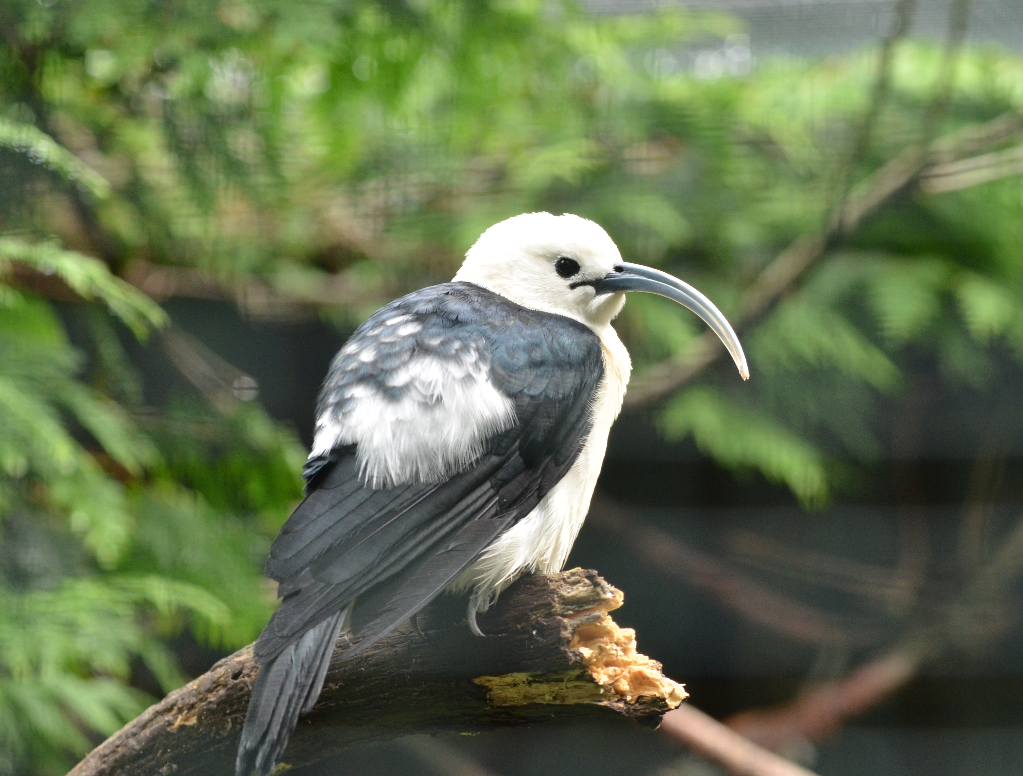 Sichelvanga (Falculea palliata)